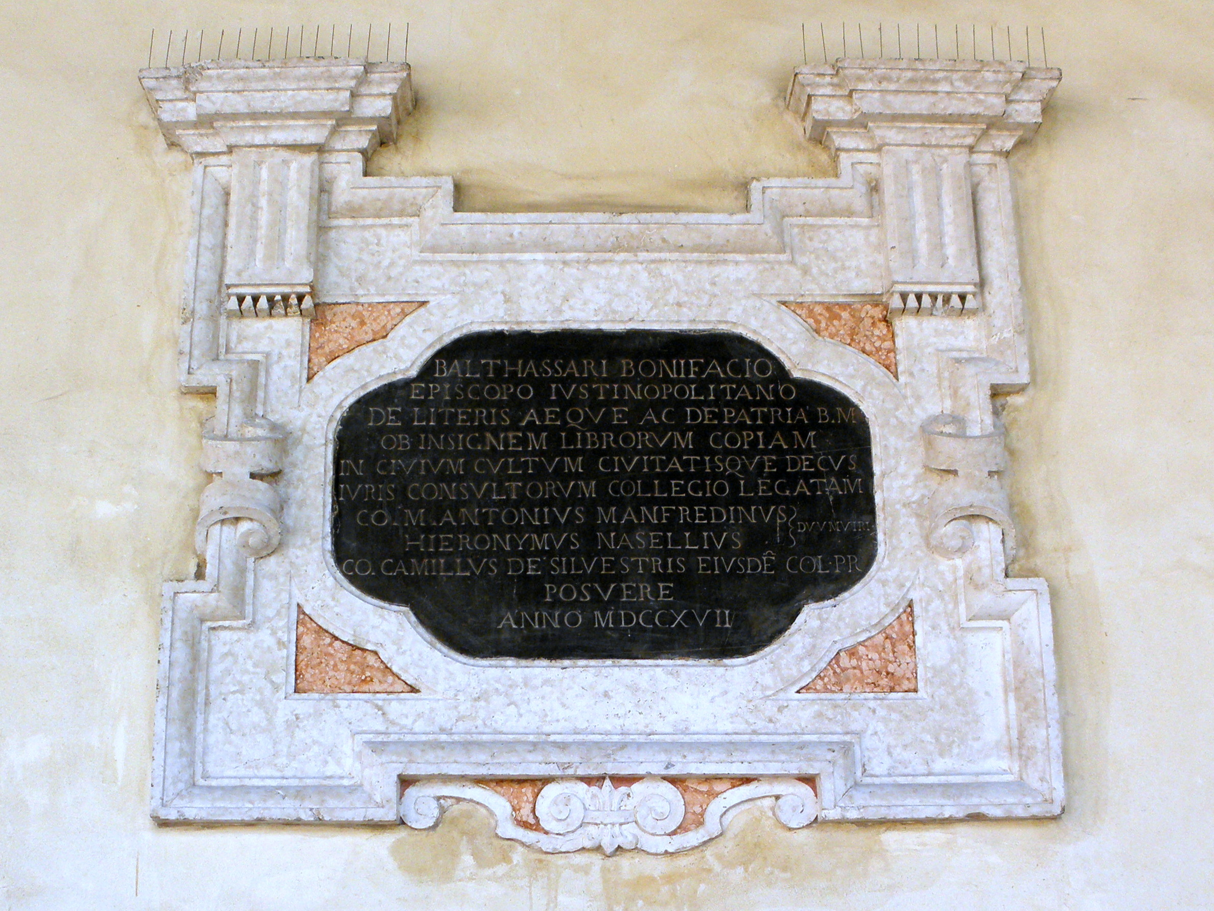 Rovigo, Chiesa della Beata Vergine del Soccorso: lapide commemorativa a ricordo di Baldassarre Bonifacio, professore all'Università di Padova e poi vescovo di Capodistria proveniente dalla "Pubblica Liberia".